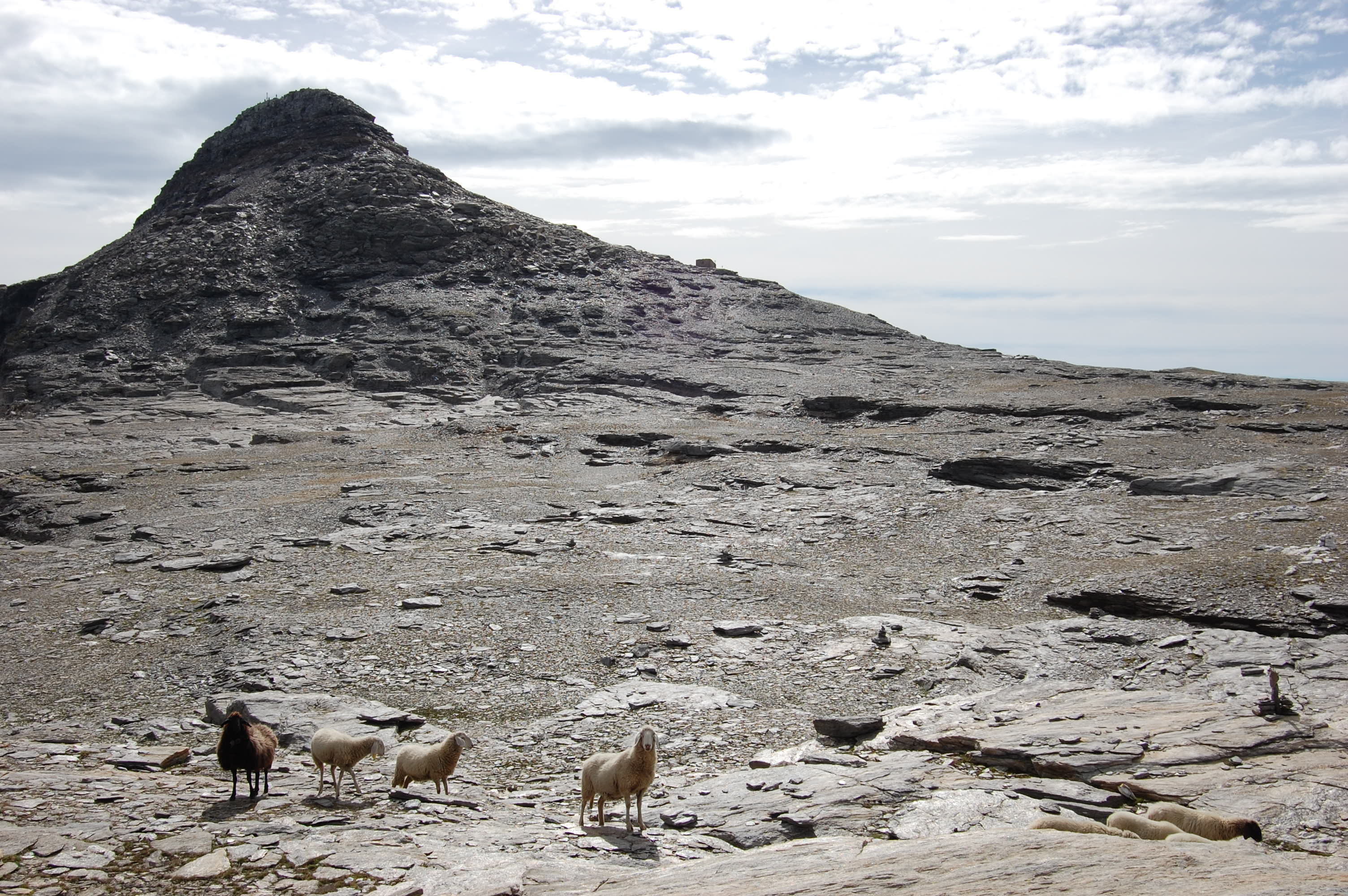 Area contigua dell'Alpe Devero (Q49963659)